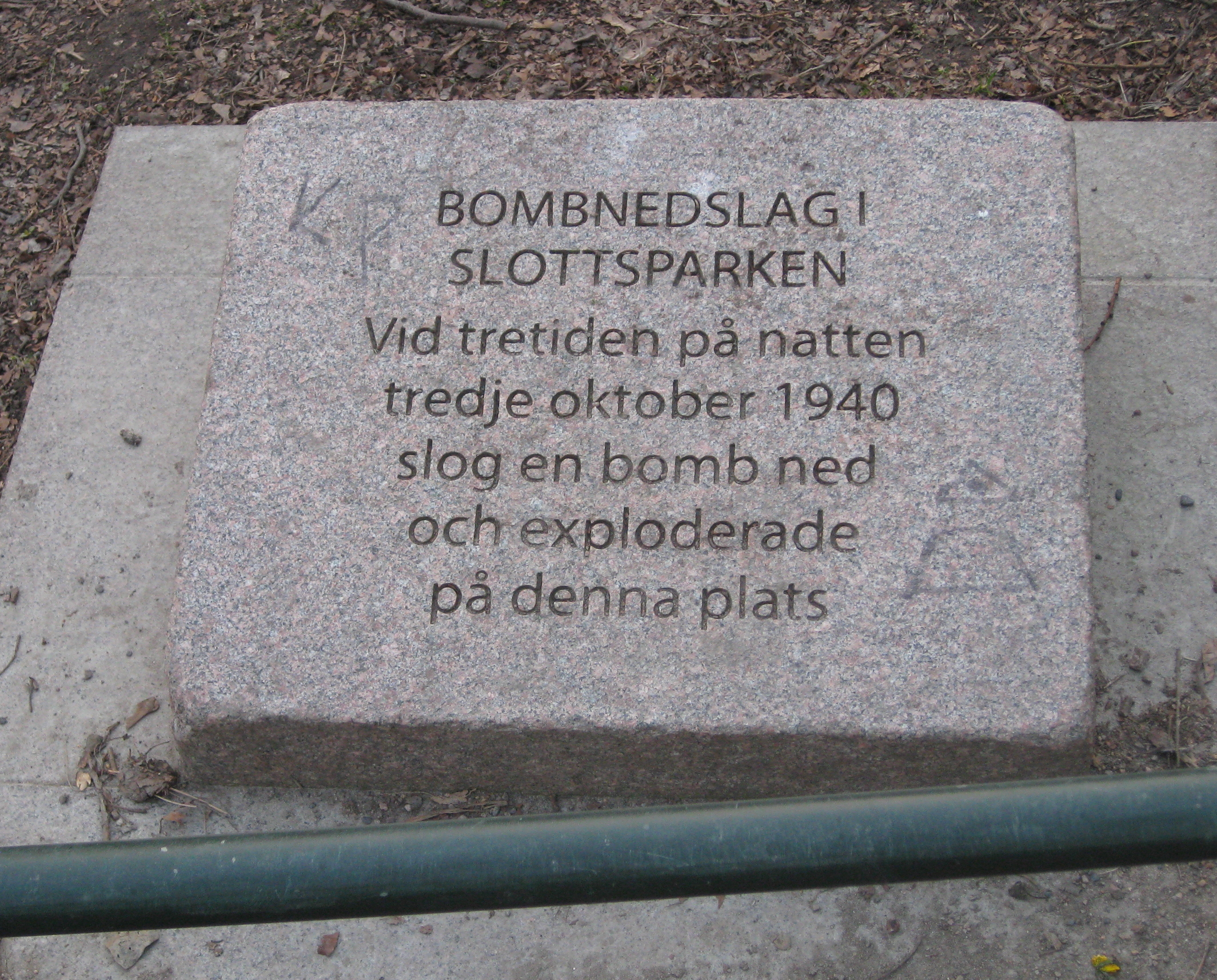 Minnestavla över Malmöbomberna 1940